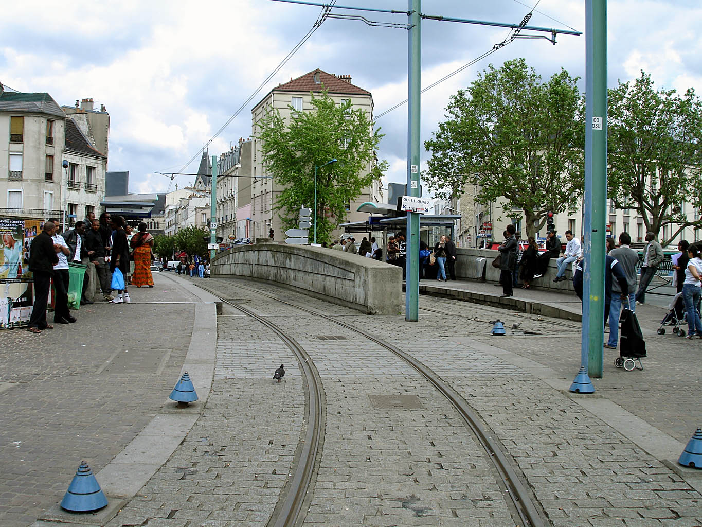 Station gare de Saint-Denis du tramway T1, Saint-Denis (Seine-Saint-Denis), France.